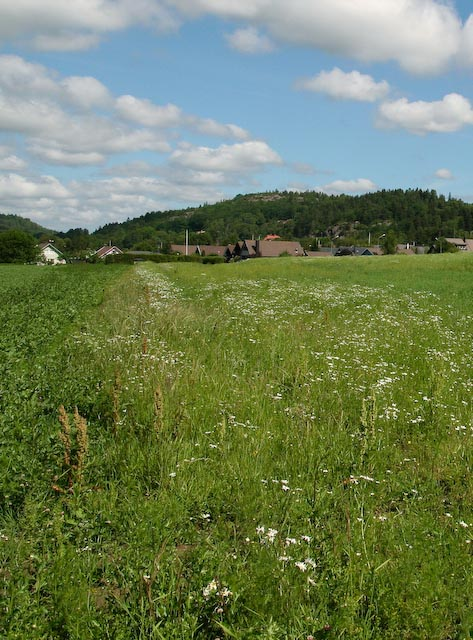 Common weeds, Sweeden